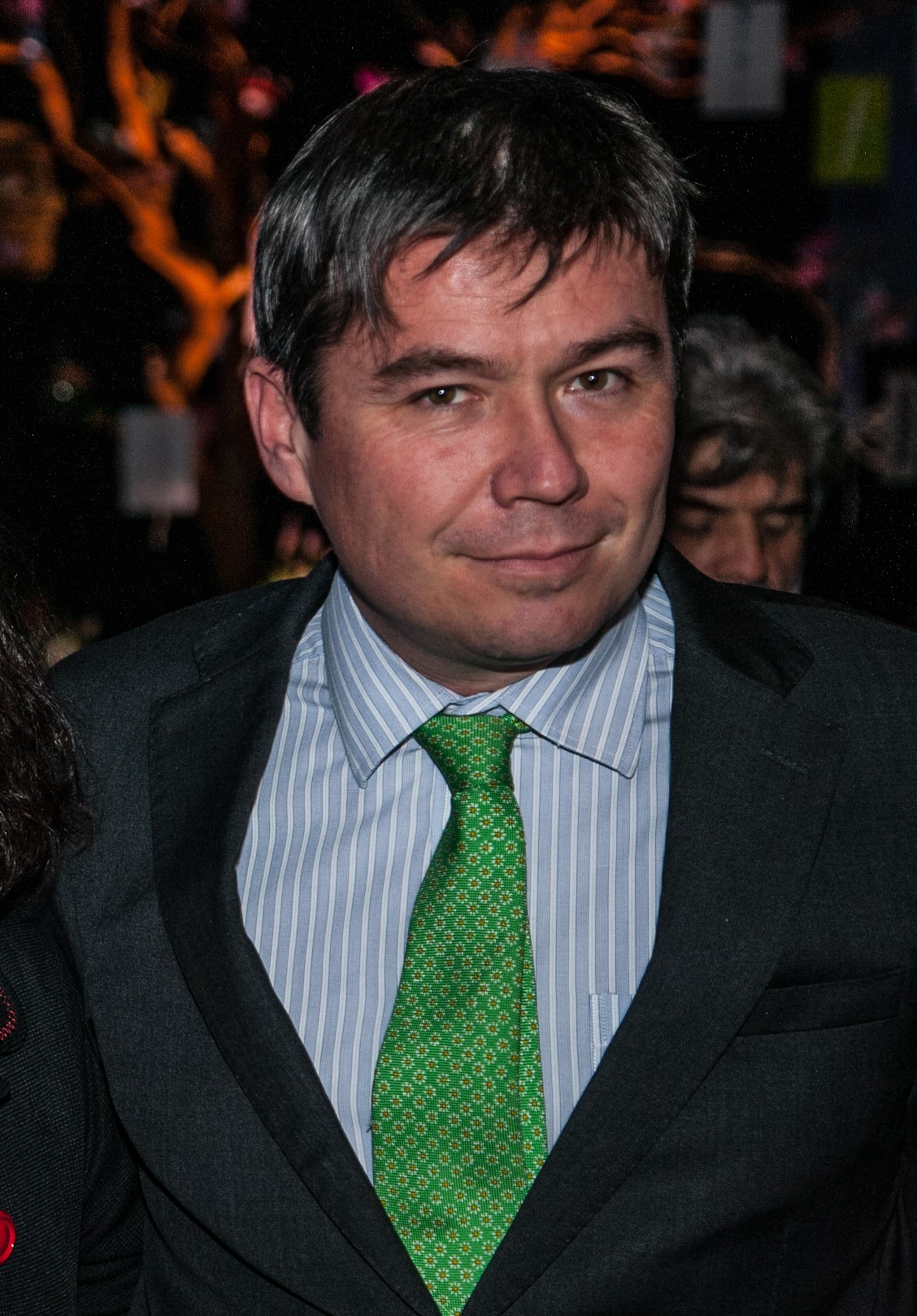 Ministro de Medioambiente Marcelo Mena Carrasco, durante Premiación Ranking de Sustentabilidad Empresarial PROhumana 2015